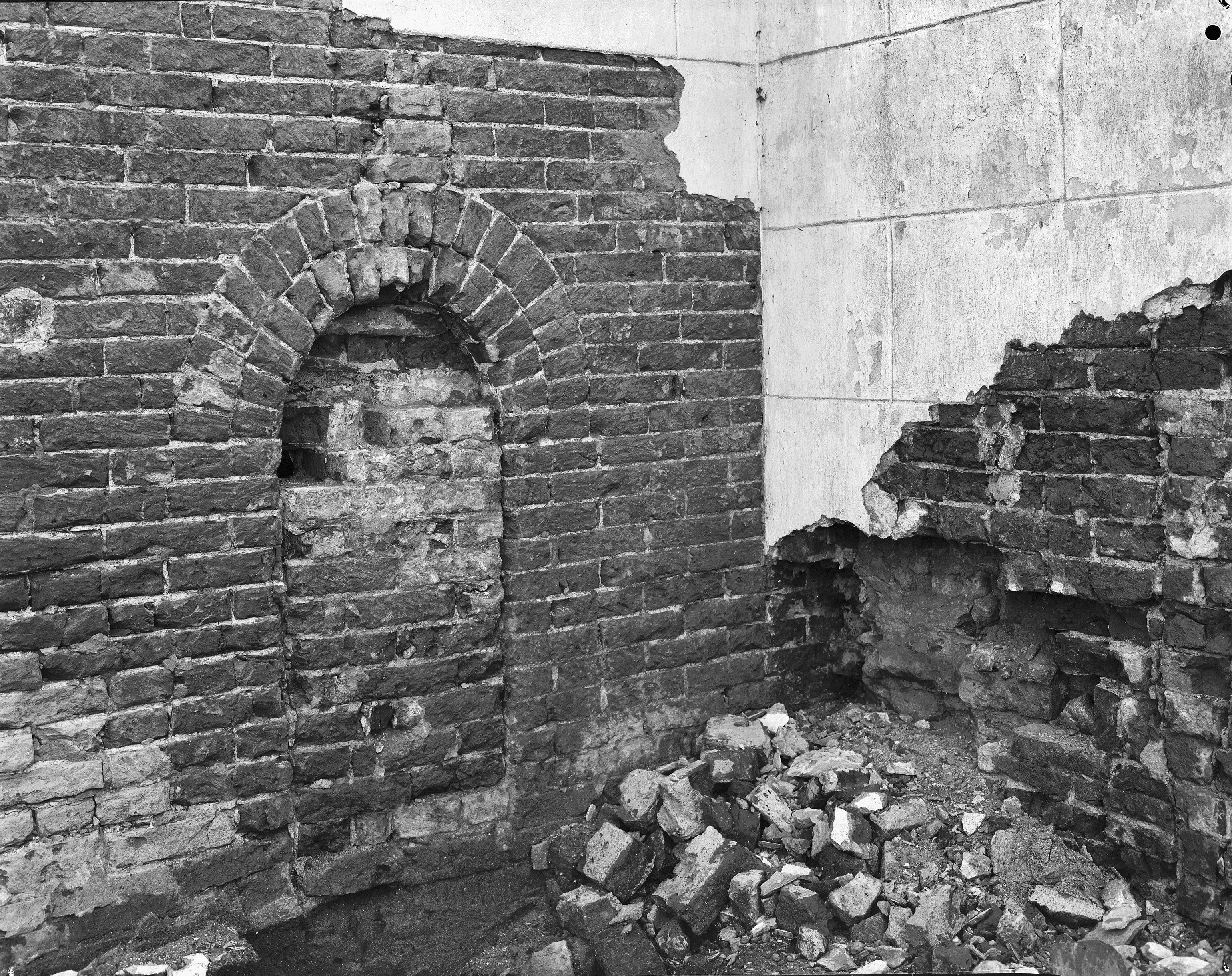 Nederlands Hervormde Kerk: noormannenpoortje noordzijde koor